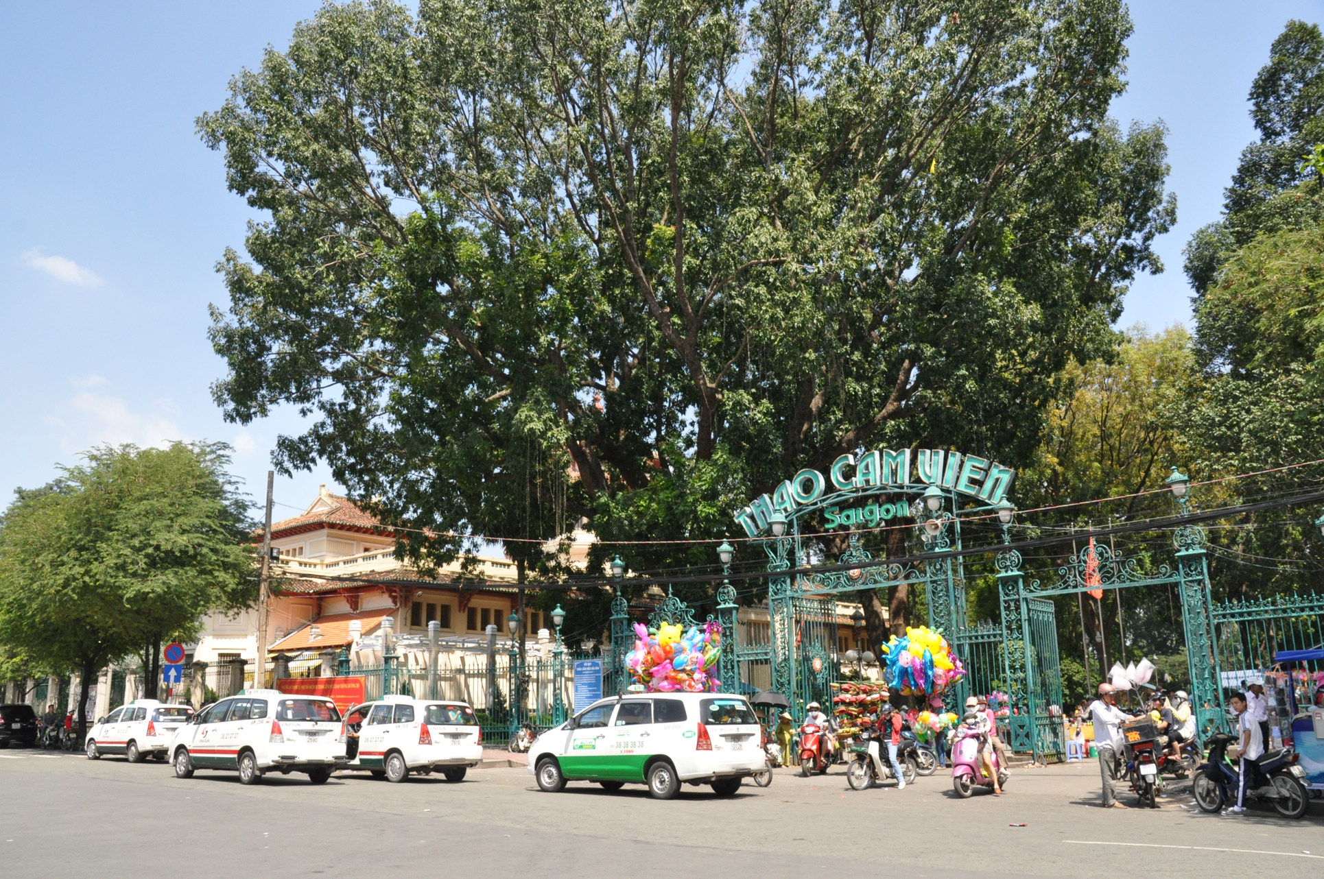 Thảo Cầm Viên , sài gòn, quận 1